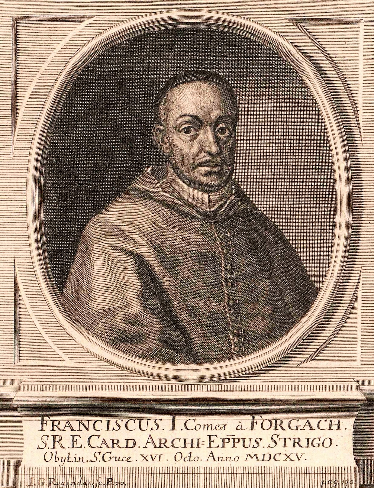 Forgách Ferenc (1566–1615) bíboros, esztergomi érsek portréja. Jeremias Gottlob Rugendas (1710–1772) rézmetszete